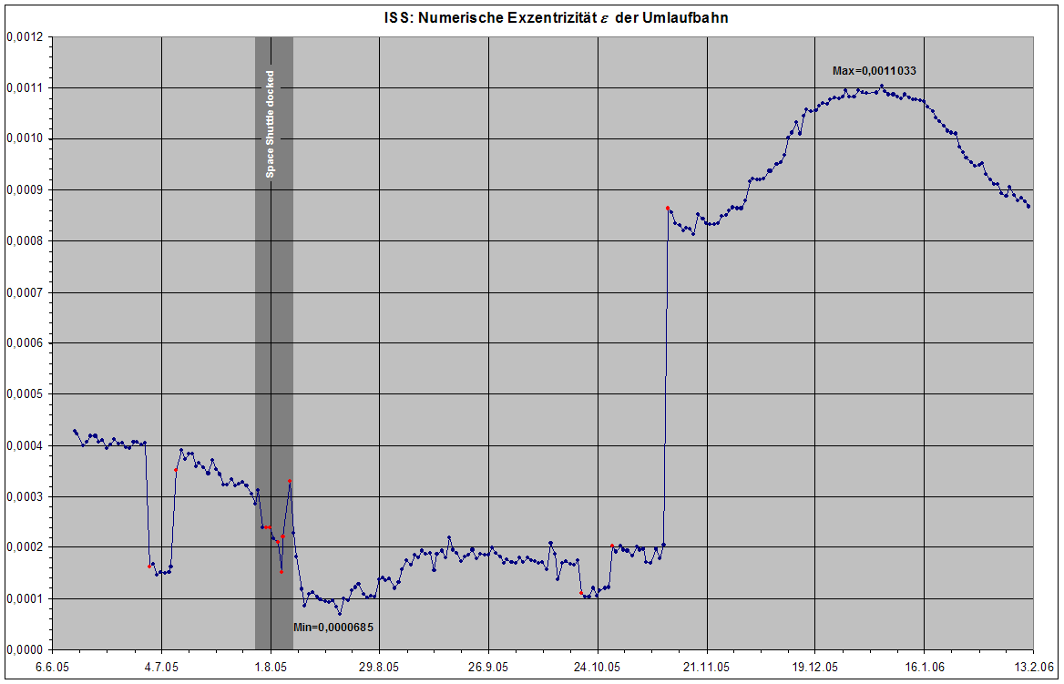 Internationale Raumstation: Verlauf der numerischen Exzentrizität